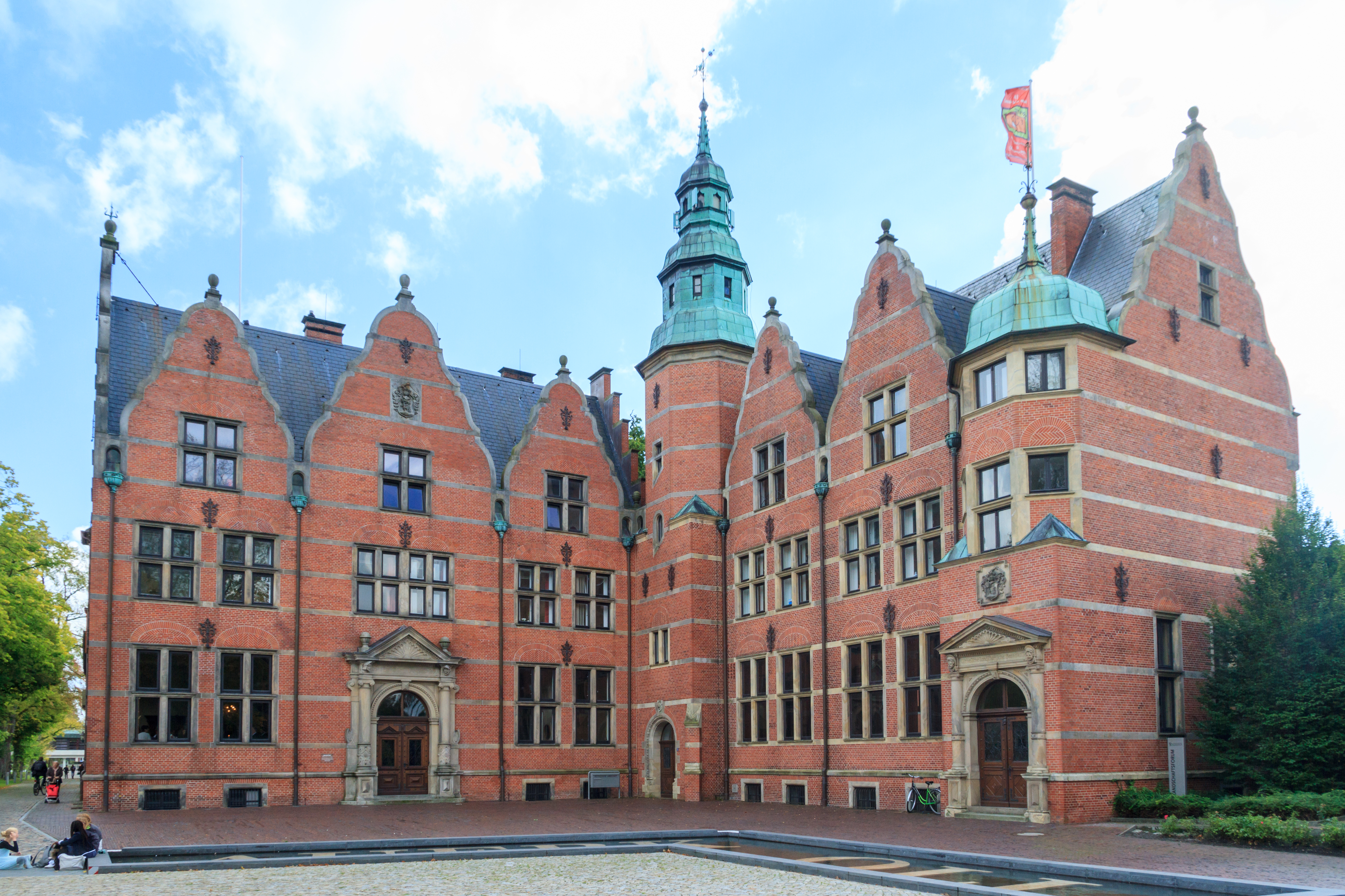 Landschaftshaus